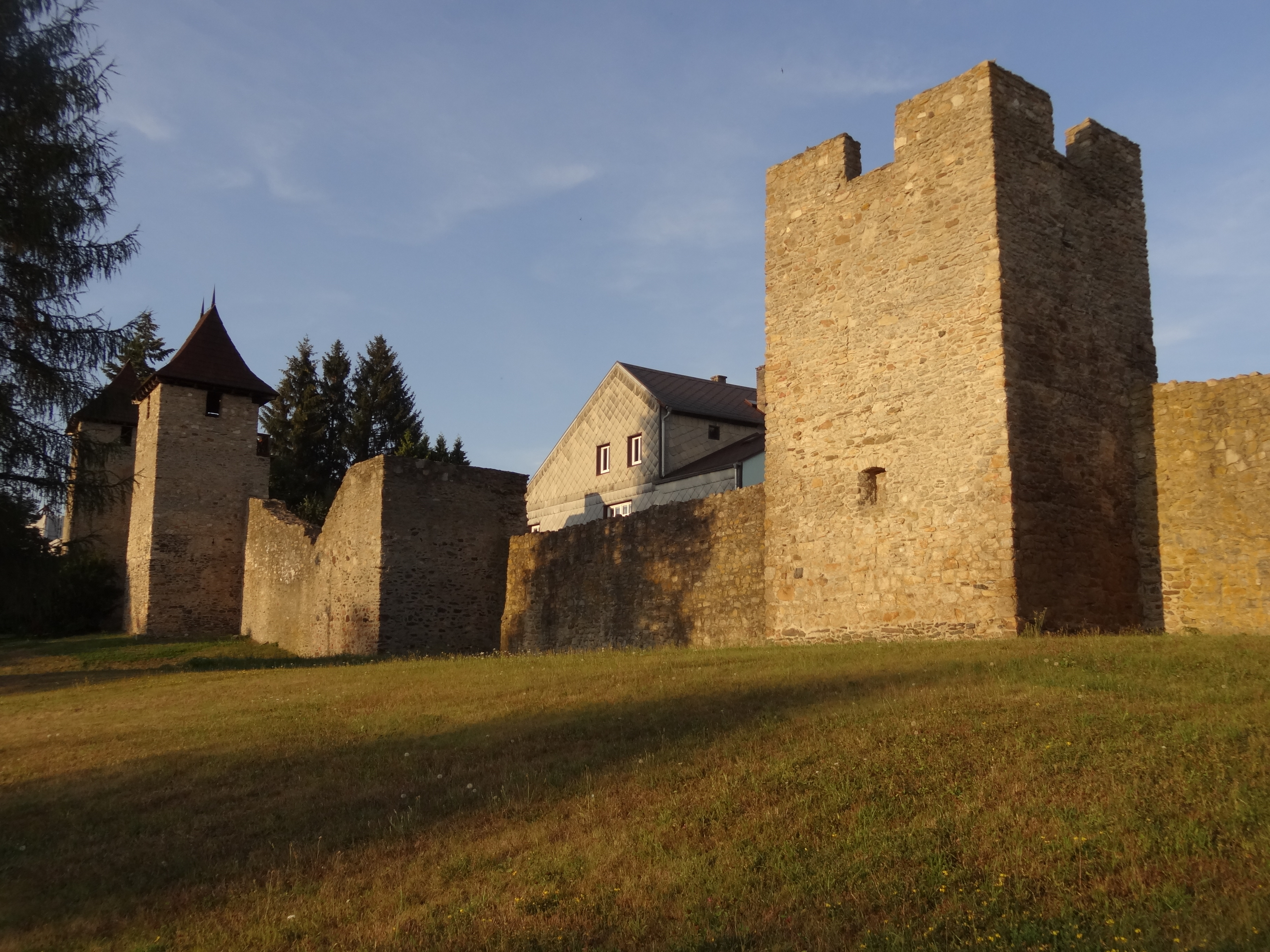 Městské opevnění, po obvodu středověkého jádra, Tachov.